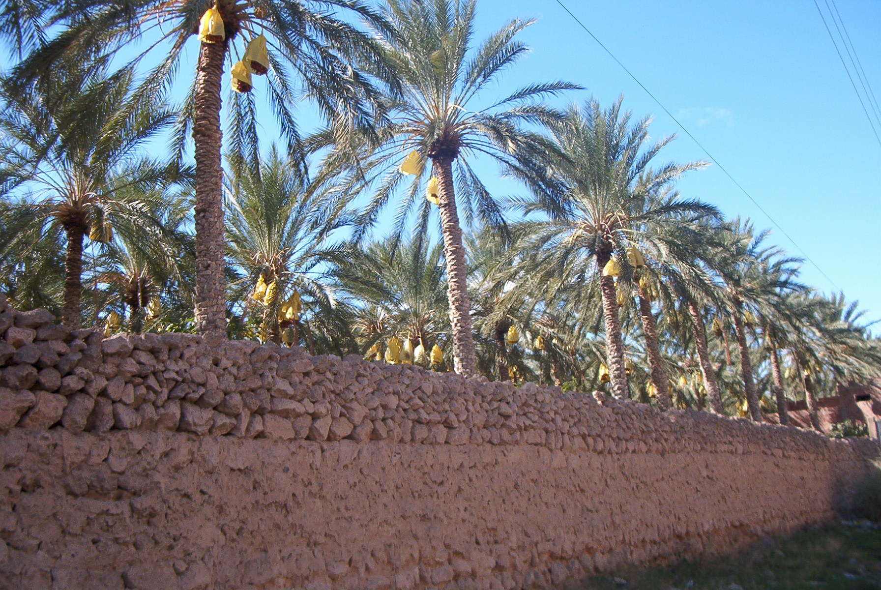 Régimes de dattes avant la cueillette à Tolga